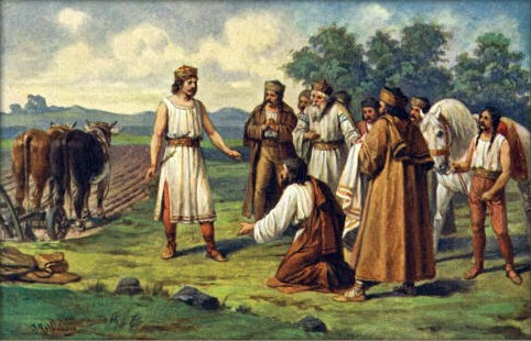 Josef Mathauser - Přemysl Oráč za knížete povolán